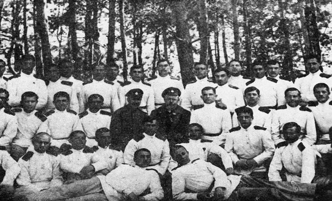 Српски (ћирилица): Питомци 36. класе Донског корпуса у Билећи